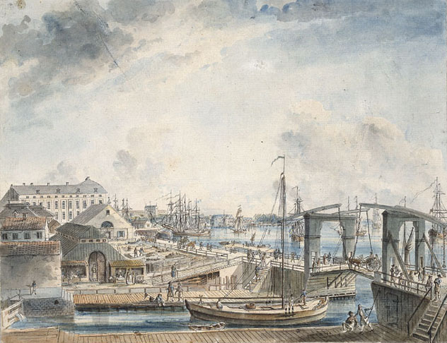 Blå Slussen